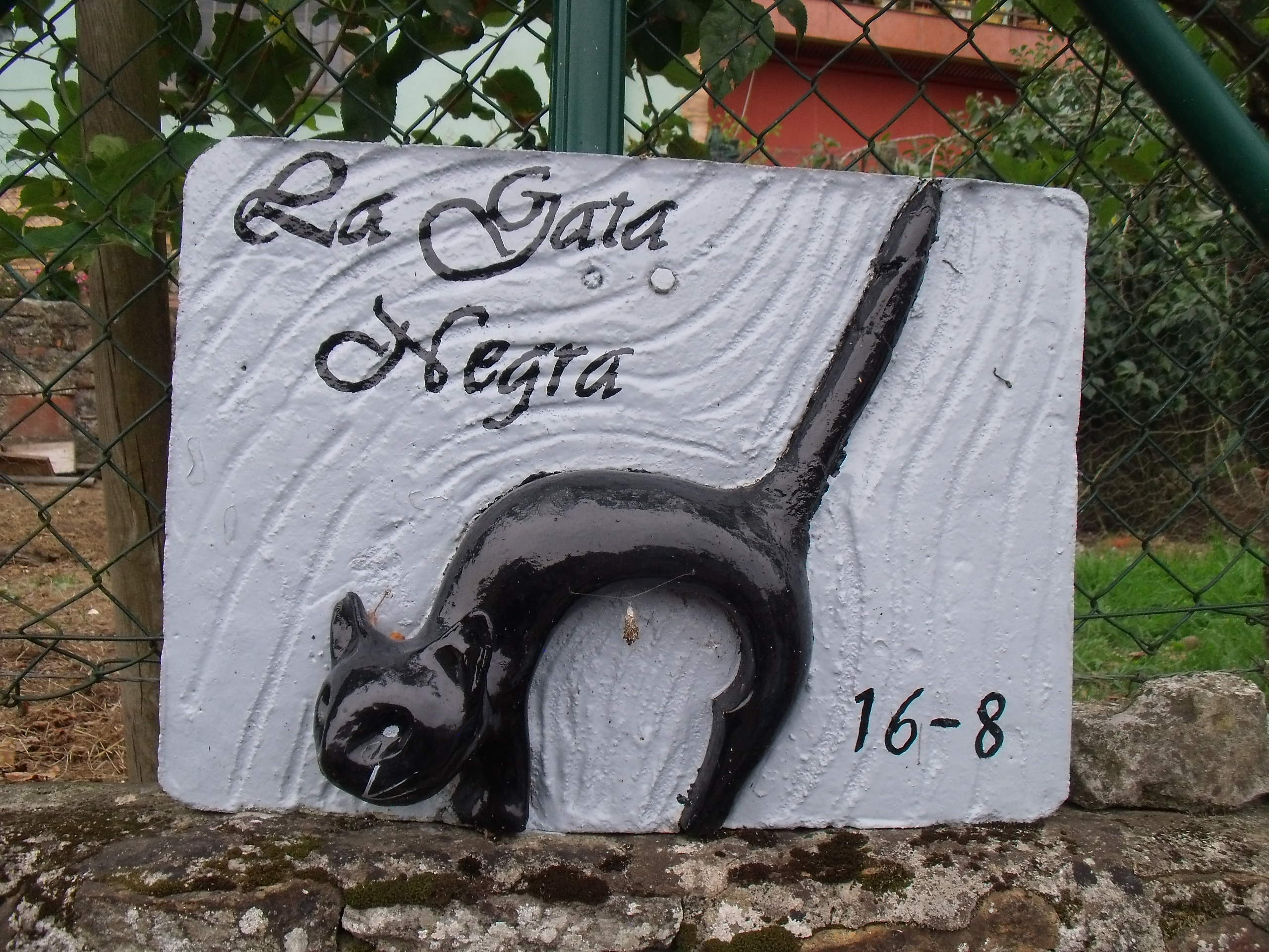 Gata Negra This is a photography of a Folklore festival in Spain (Wikidata id Q6135210).